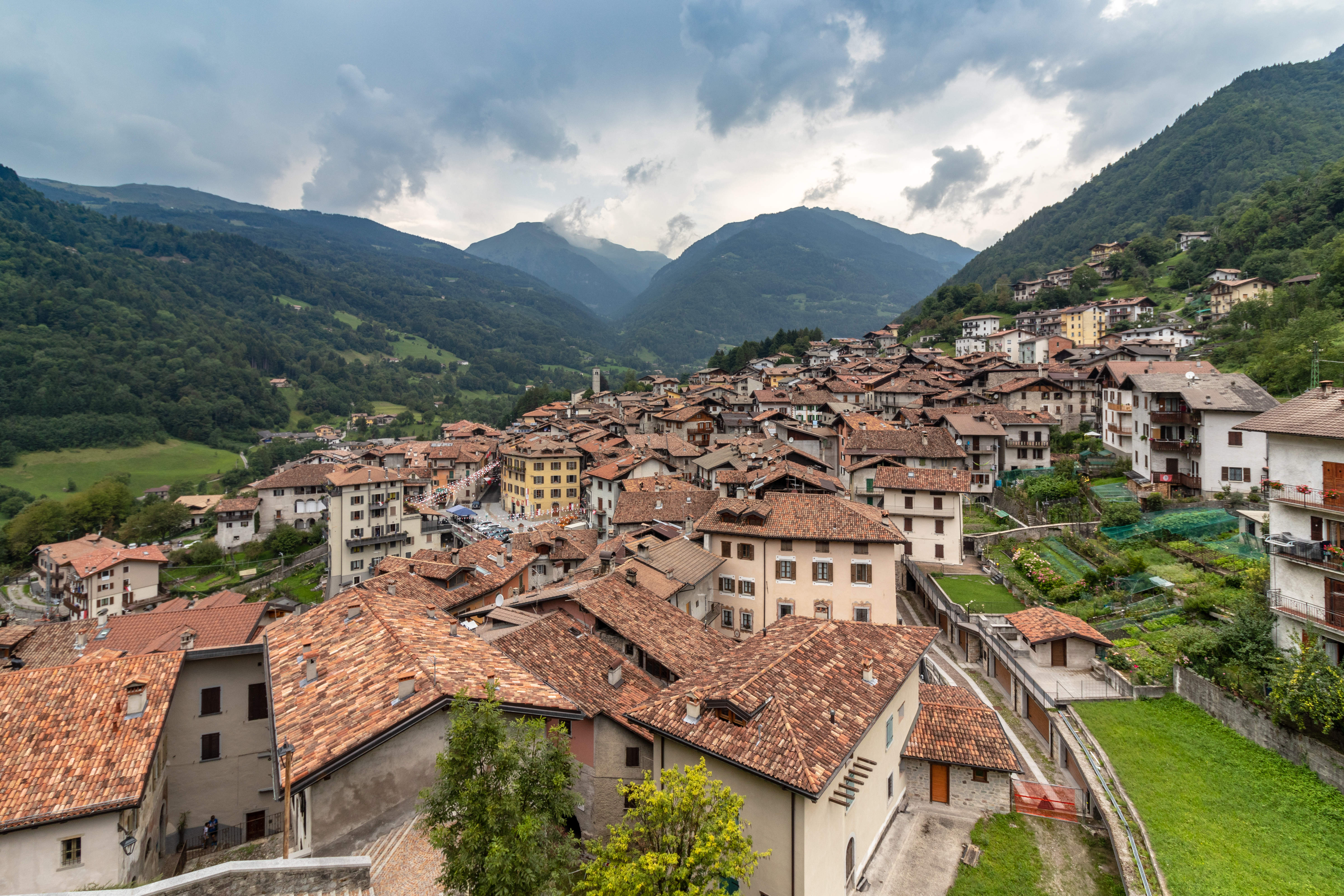 Bagolino, nahe dem Idrosee